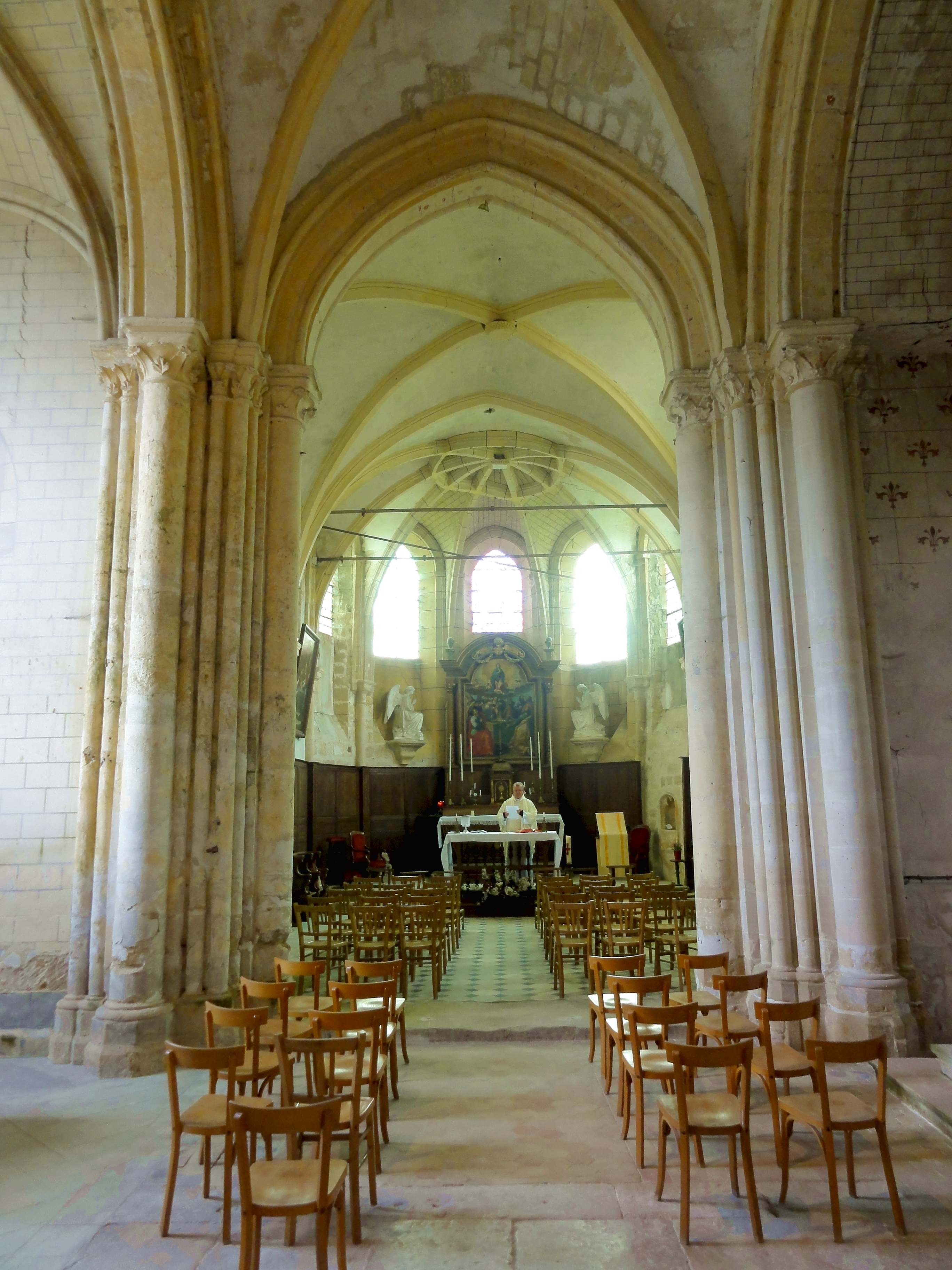 Intérieur de l'église - voir titre.